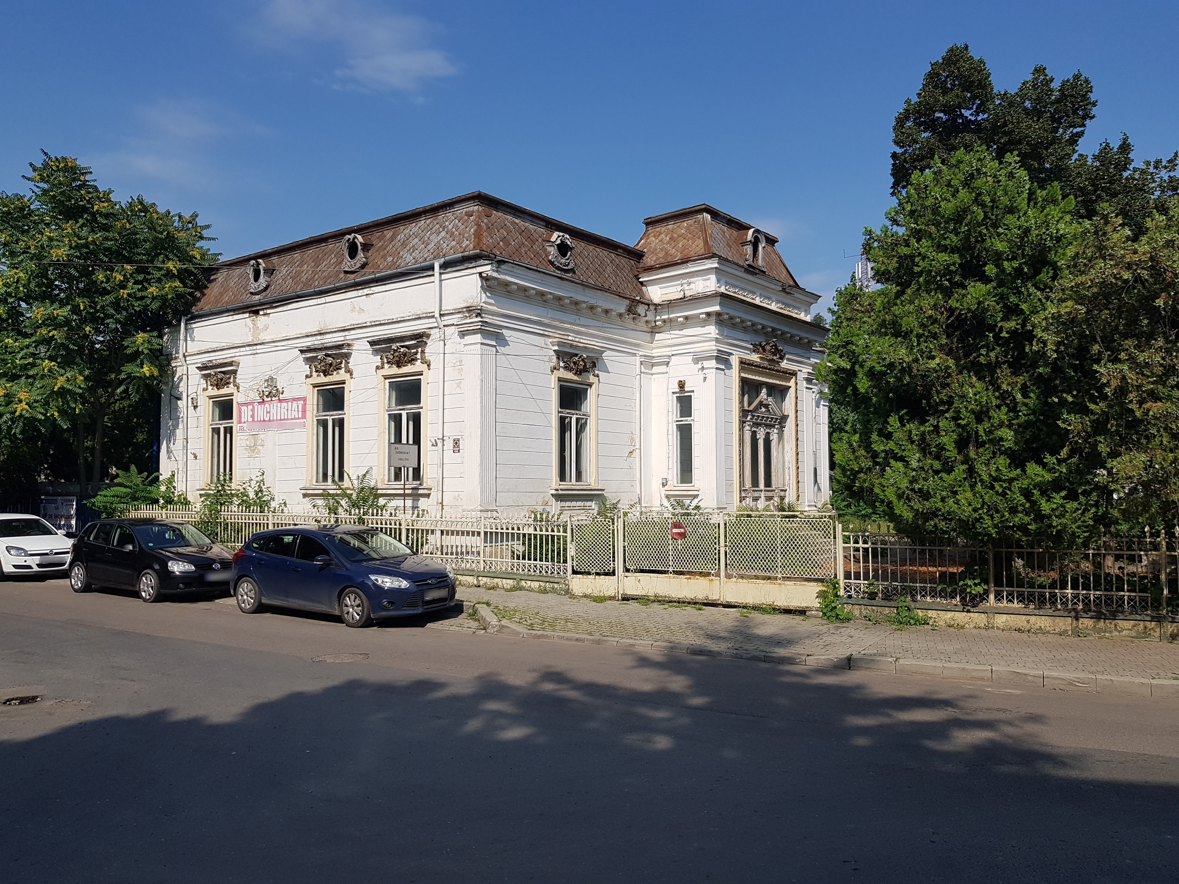 Casa Blum